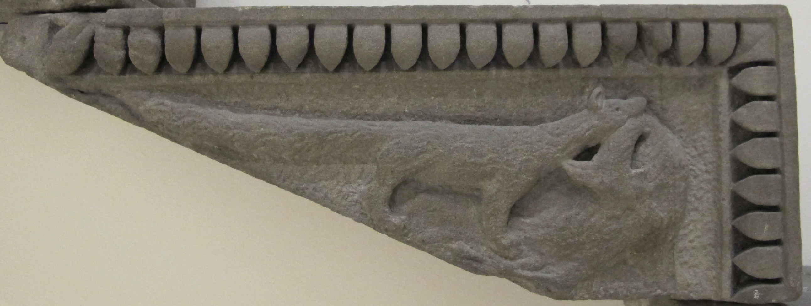 Giuliano da sangallo, gradini da palazzo gondi, 1490-1501